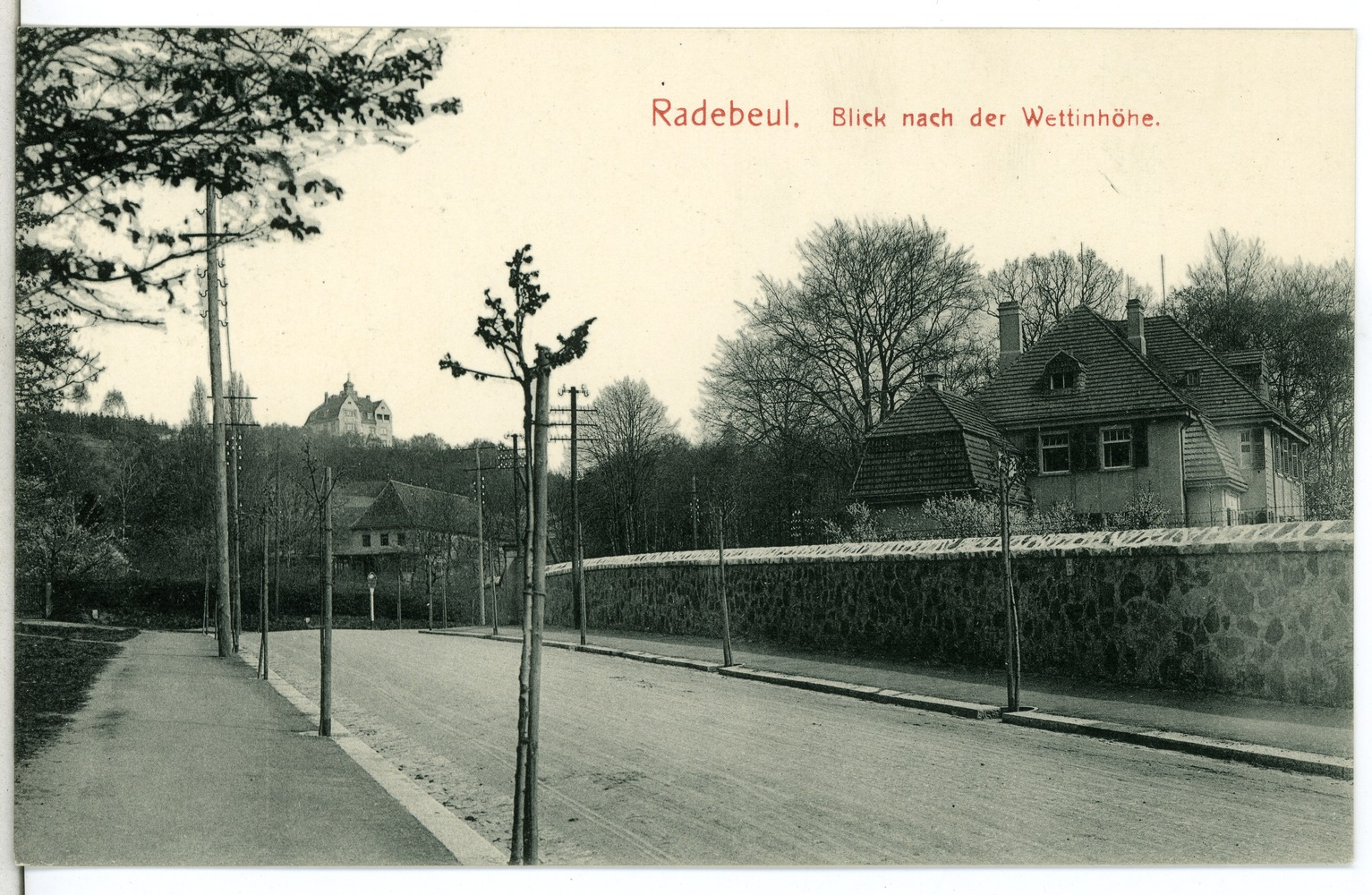 Radebeul; Blick nach der Wettinhöhe This postcard is from publisher Brück & Sohn in Meißen ( postcard has a unique number 13096 and is available in a higher resolution at the publisher. This images was uploaded in a cooperation project between Wikipedians and the publisher.